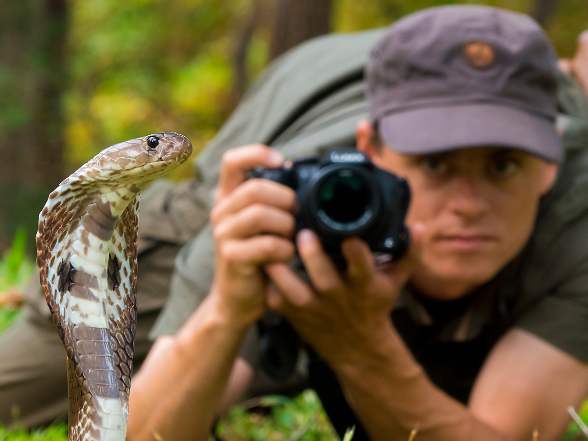 Máté Bence kobrát fotózik Sri Lankán